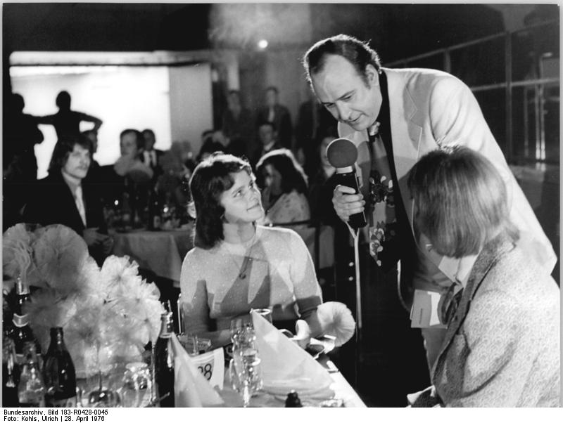 ADN-ZB Kohls 28.4.1976 Berlin: "Ball der Jugend" im Palast der Republik- Während des Ballprogramms im Großen Saal des Palastes interviewte Wolfgang Reichardt die vorbildlichen Jugendlichen aus der Maxhütte Unterwellenborn Heidrun Hicketier und Wilfried Küchler."